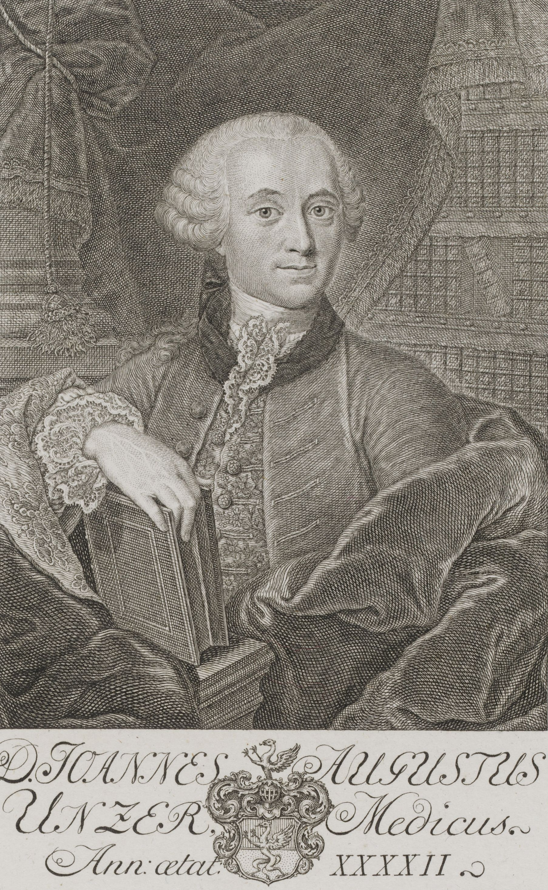 D. Joannes Augustus Unzer Medicus